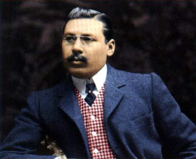 Enrique Allende, Presidente del Atlético de Madrid en 1903